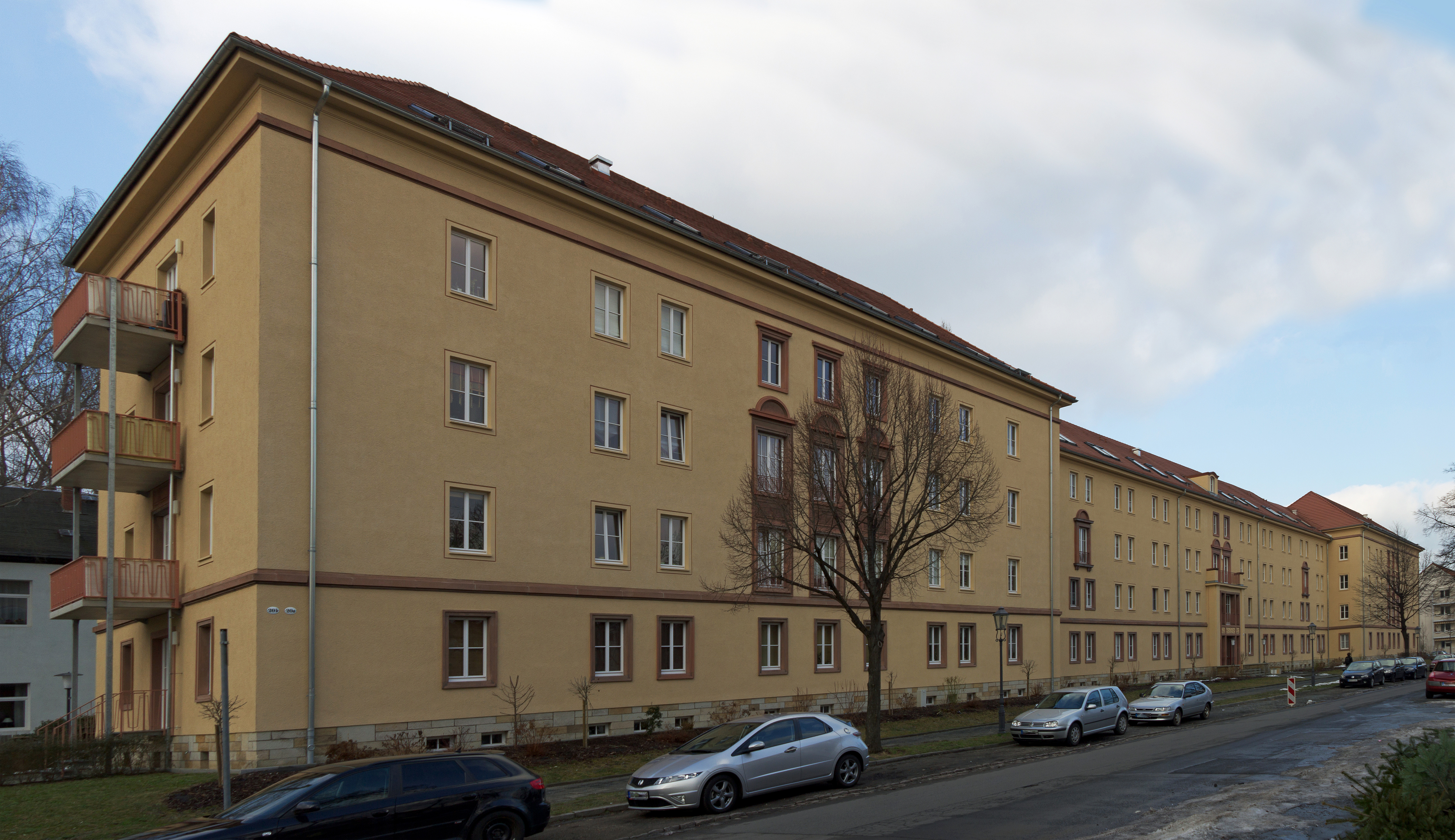 Schwesternwohnheim Tittmannstraße in Dresden